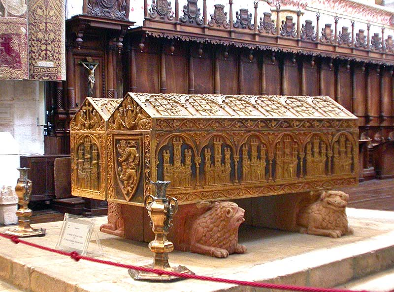 Sepulcros del rey Alfonso VIII de Castilla (1155-1214) y de su esposa, la reina Leonor de Plantagenet (1160-1214). (Monasterio de las Huelgas de Burgos).